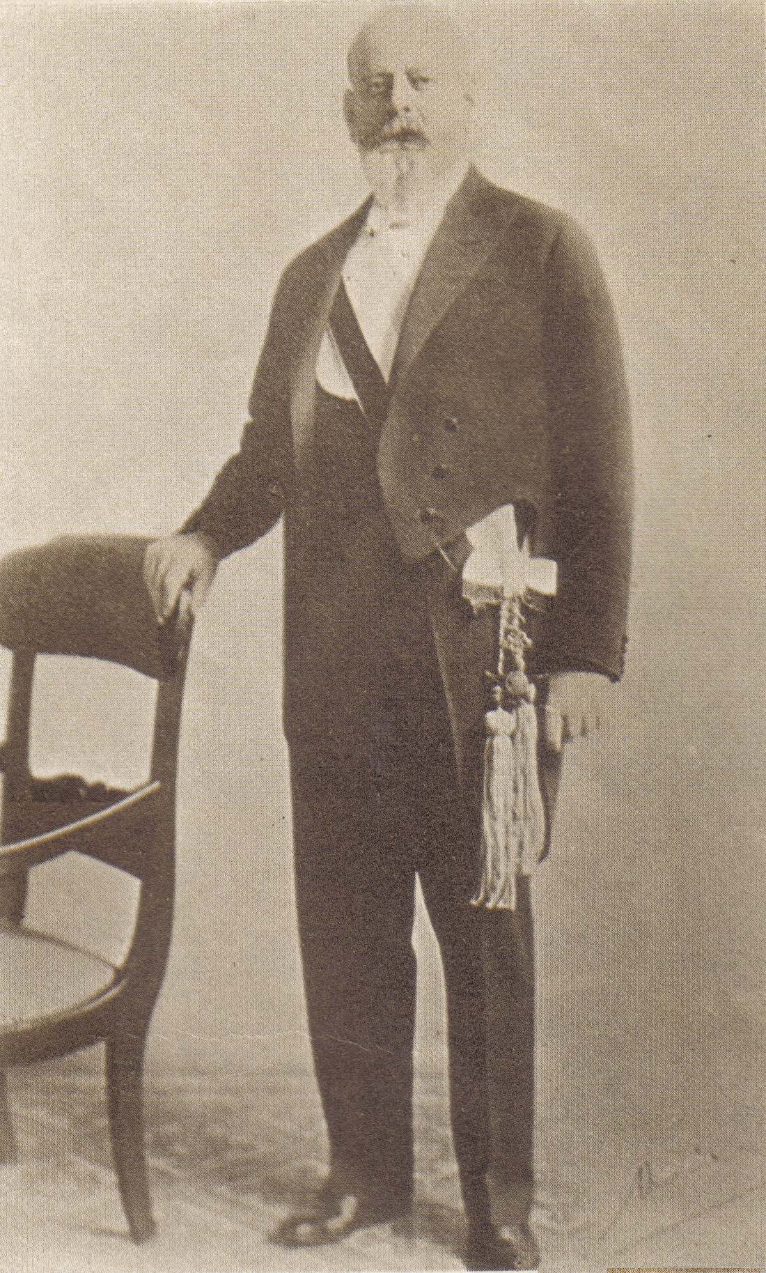 Emiliano Figueroa Larraín (Santiago, 12 de julio de 1866 - Santiago, 16 de mayo de 1931). Presidente de la República de Chile.